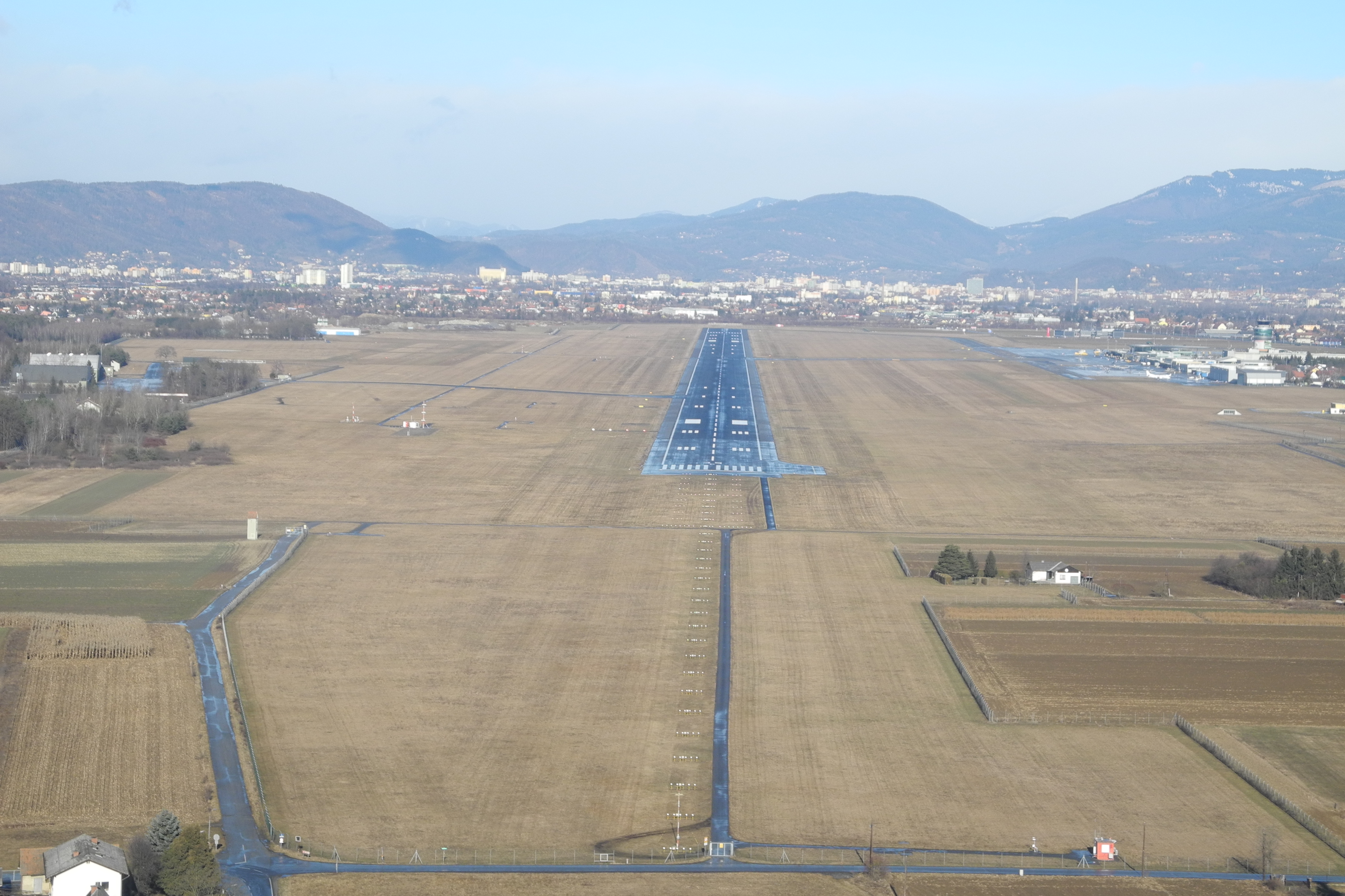 Graz RWY 35C